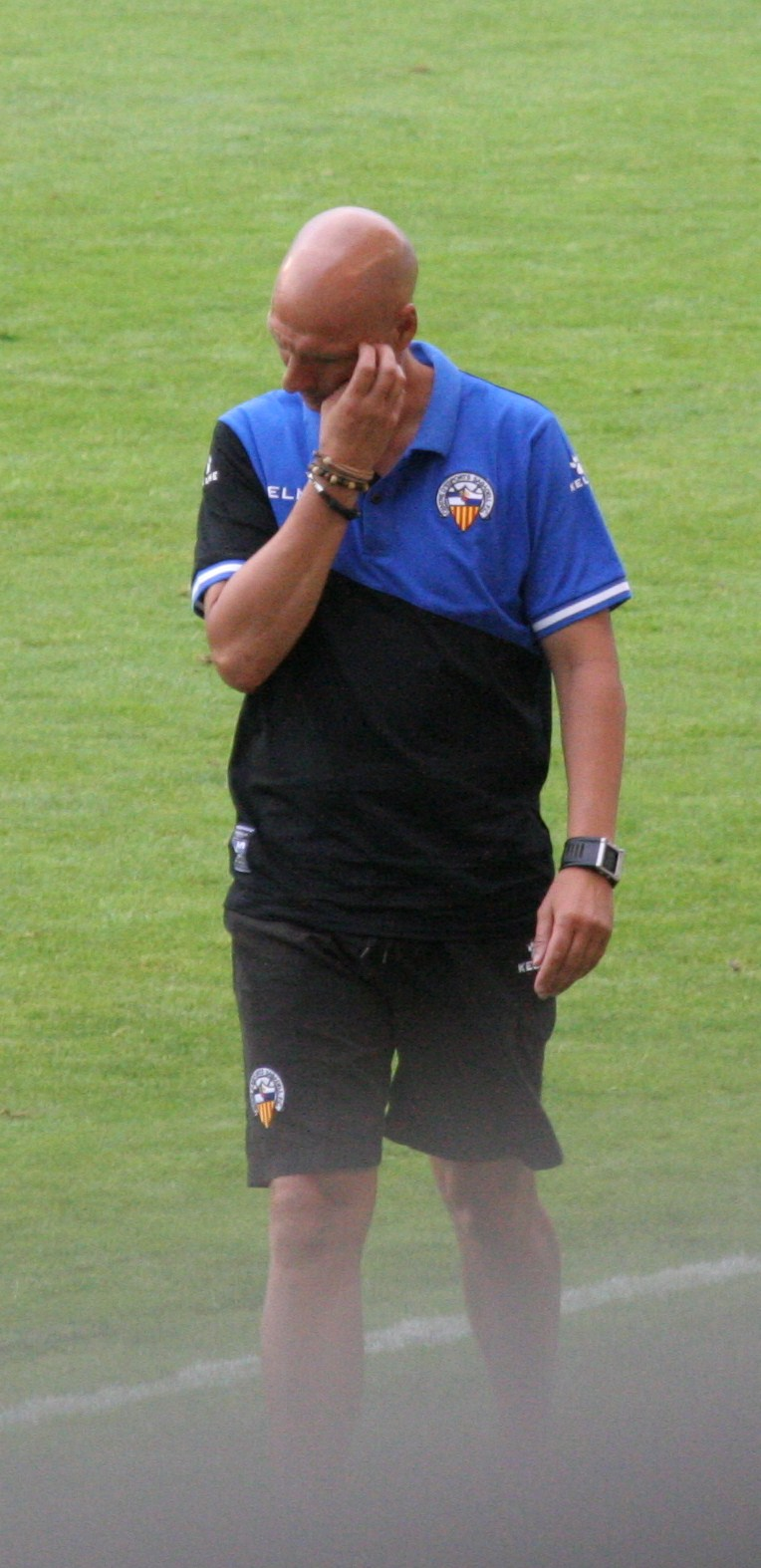 Miquel Olmo ago 2014